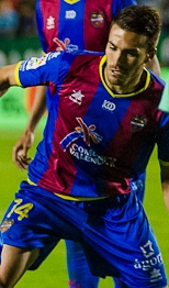 El jugador granota Xavi Torres